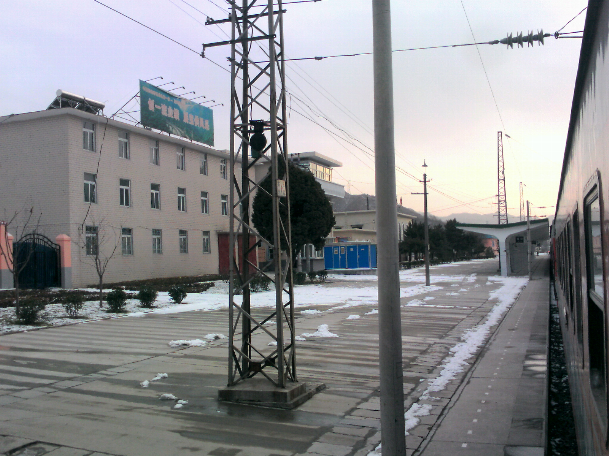 Fengxian, Baoji, Shaanxi, China